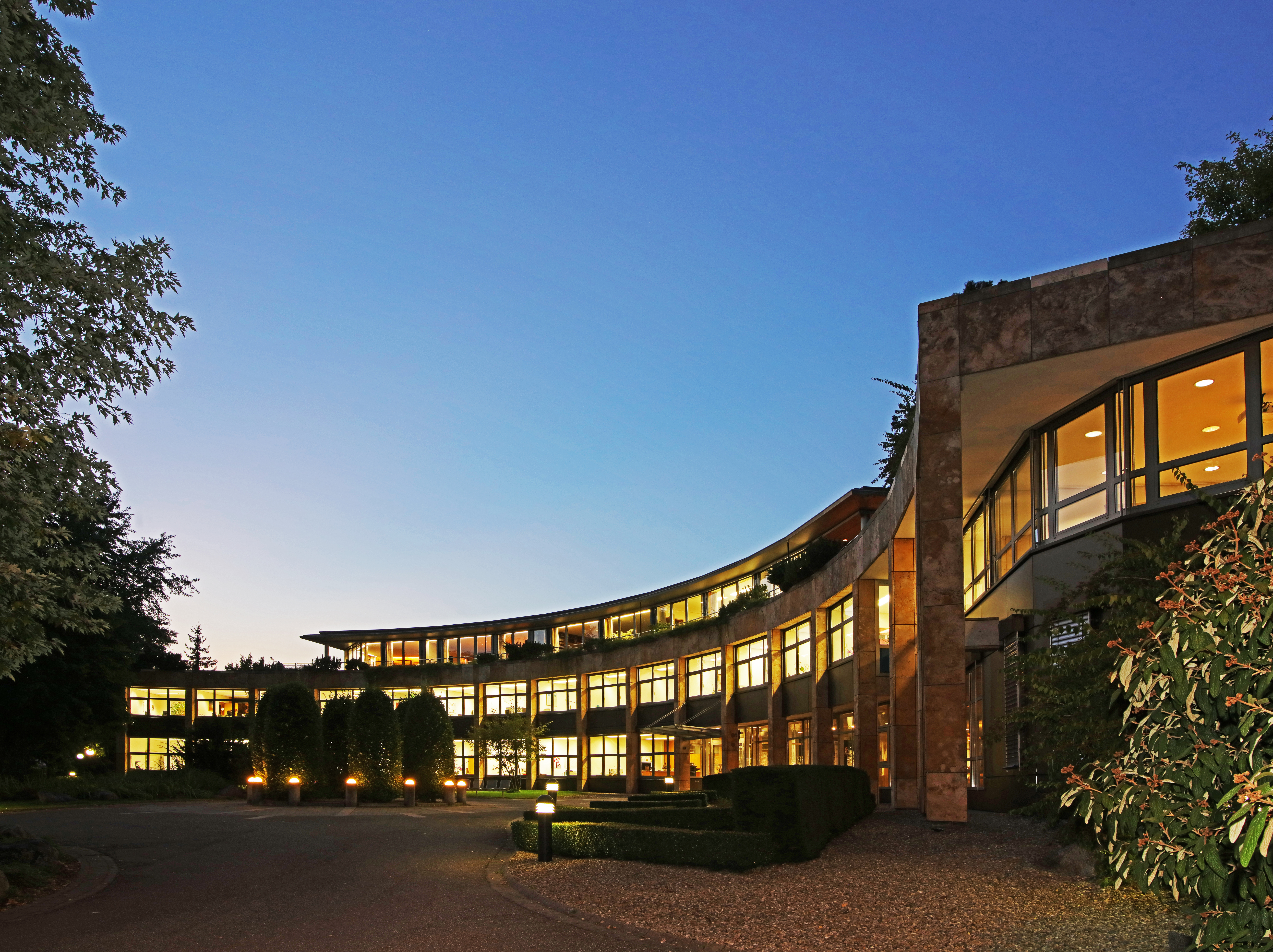 Bild von 2016. Das Gebäude selbst wurde 1986 fertiggestellt und bezogen.